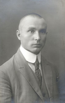 Villem Ernits